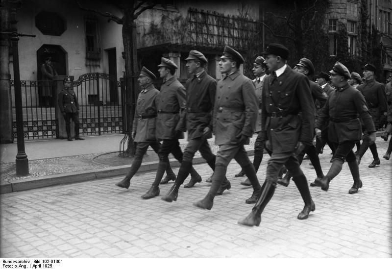 Riesenkundgebung für Hindenburg, dem Kandidaten des Reichsblockes vor seiner Villa in Hannover. Von Hindenburg nahm den Vorbeimarsch von Vaterländischen Verbänden von der Treppe seiner Villa ab. Jungmannen defilieren im Parademarsch vor Hindenburg x.